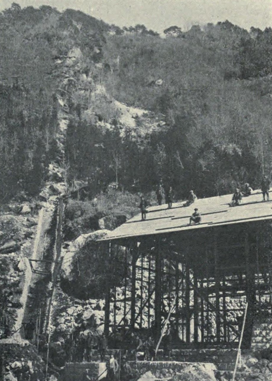 岡崎電灯発電所